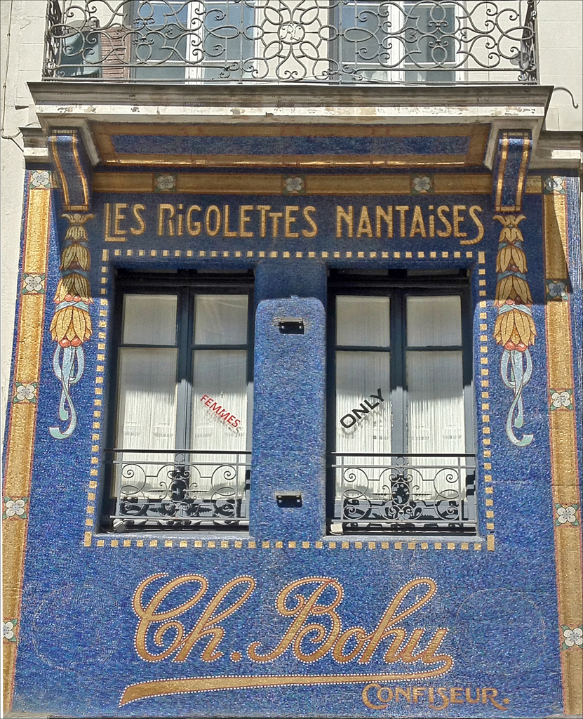 La Rigolette de Nantes En 1902, Charles Bohu créa un bonbon dont le procédé de fabrication est complexe. C' est à partir d'une fine coque de sucre cuite à la vapeur, que la Rigolette est fourrée d'une véritable pulpe de fruits. Cinq parfums : ananas , cassis, citron, framboise, mandarine. Rigolette est le nom de la Chatte de Mr Bohu, qui amateur d' opéra la dénomma ainsi en hommage à Verdi et à son Rigoletto. extrait du site